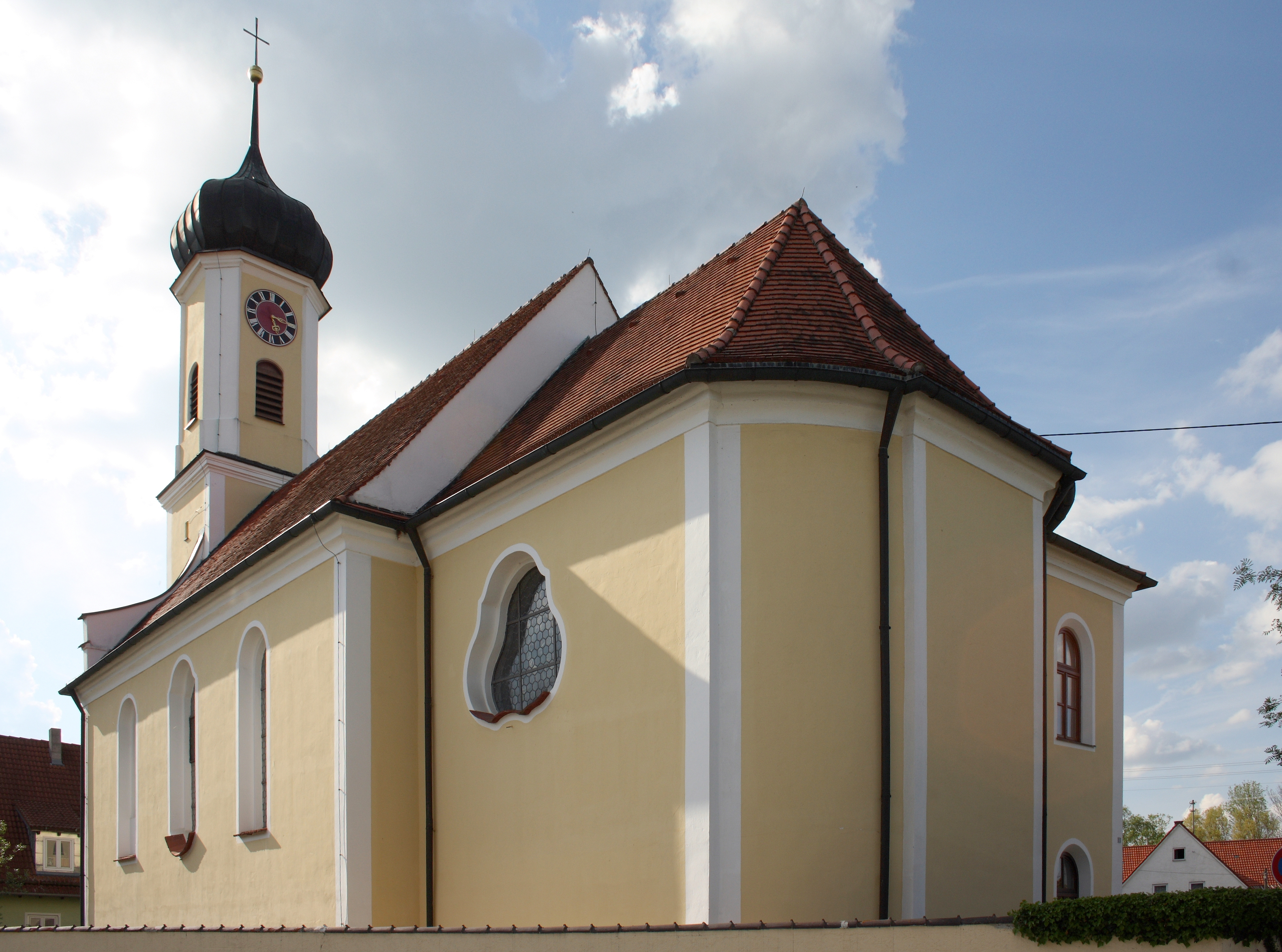 Katholische Pfarrkirche St. Ägidius in Schabringen, einem Ortsteil von Wittislingen im Landkreis Dillingen an der Donau (Bayern), Ansicht von Südosten